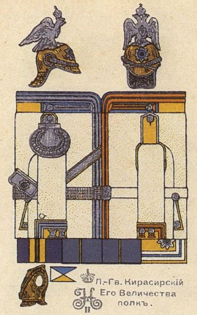 Форма обмундирования парадная лейб-гвардии Кирасирского Его Величества полка. 1910 год.